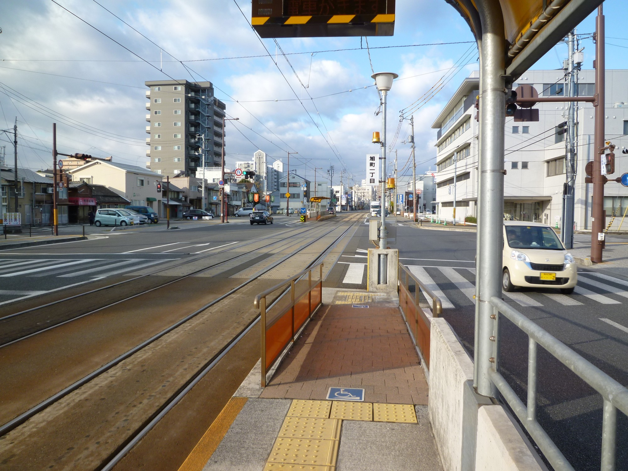 2015年1月2日撮影。